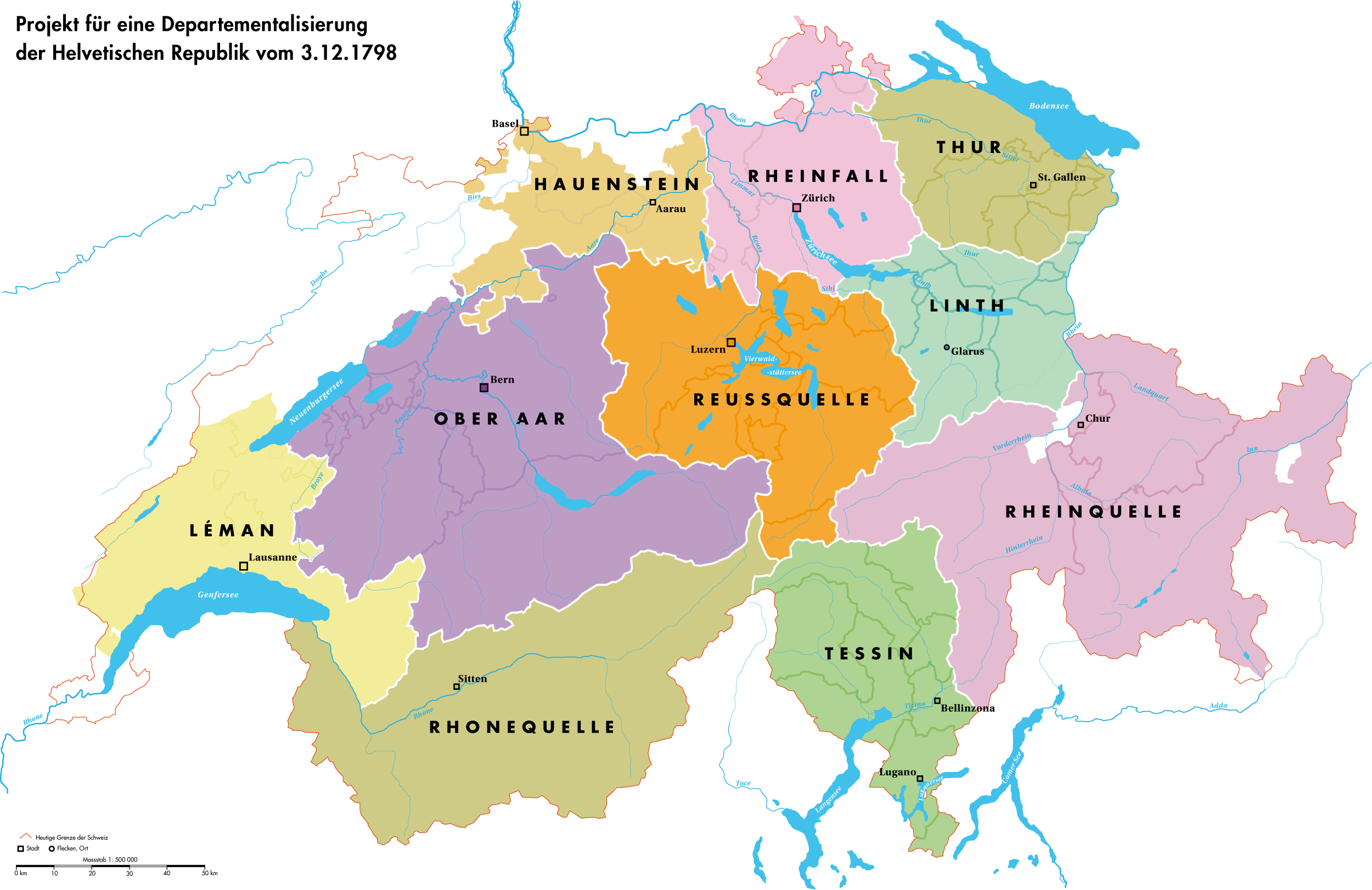 Projekt für eine Departementalisierung der Helvetischen Republik vom 3. Dezember 1798